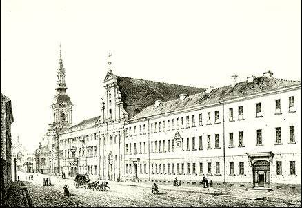 Kalisz, Kolegium Jezuickie